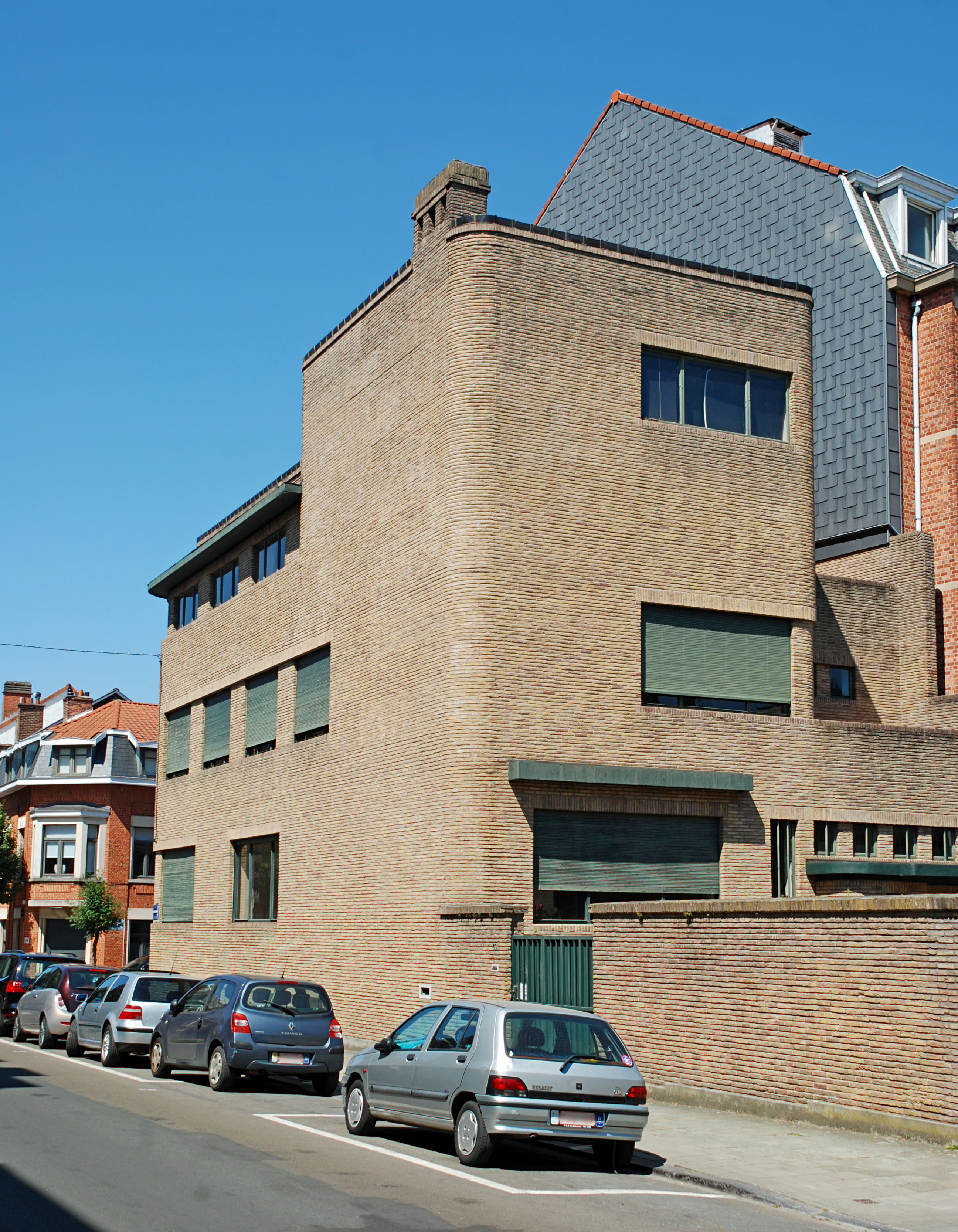 Belgique - Région de Bruxelles-Capitale - Ixelles - Maison Wolfers (modernisme, architecte Henry Van de Velde, 1929)